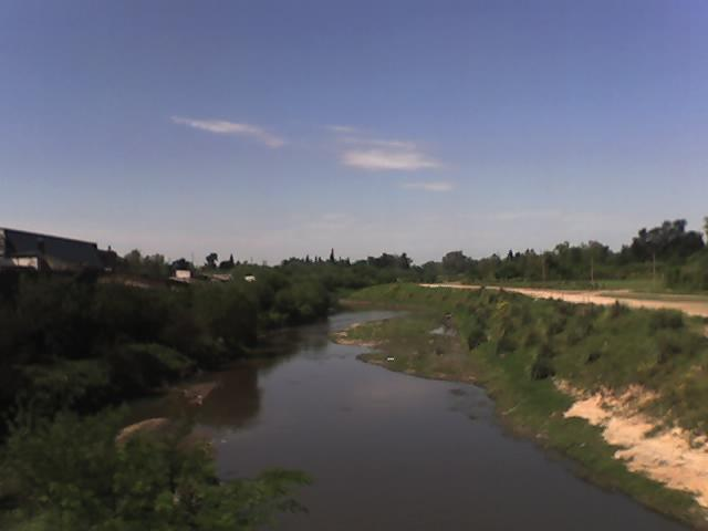 Reconquista River, Buenos Aires Province, Argentina.